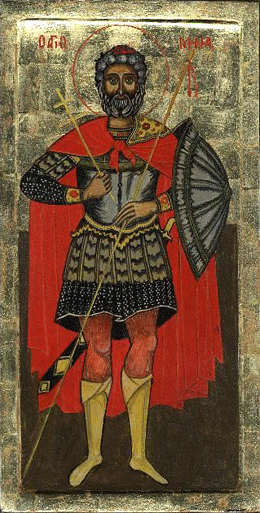 Saint Menas // святой Мина